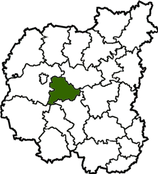 Kulykivskyi-Raion map